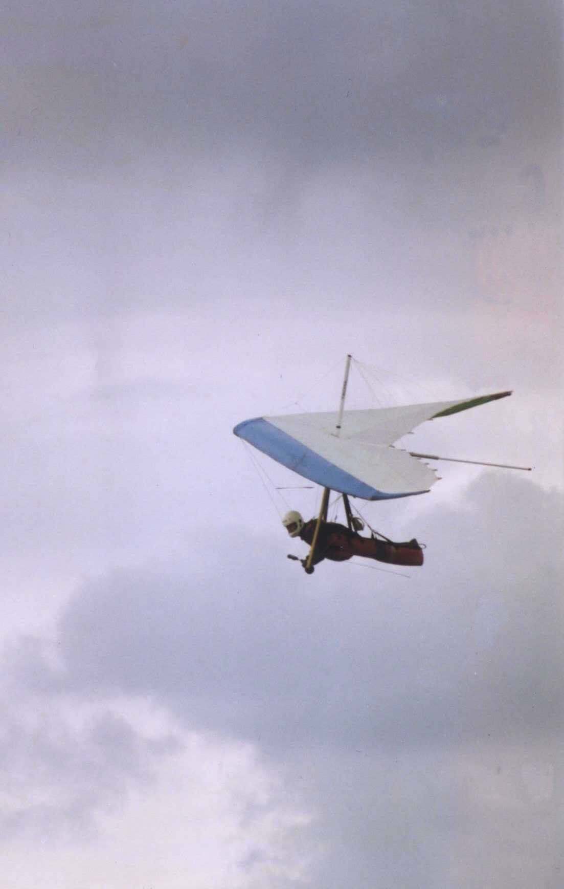 vuelo libre